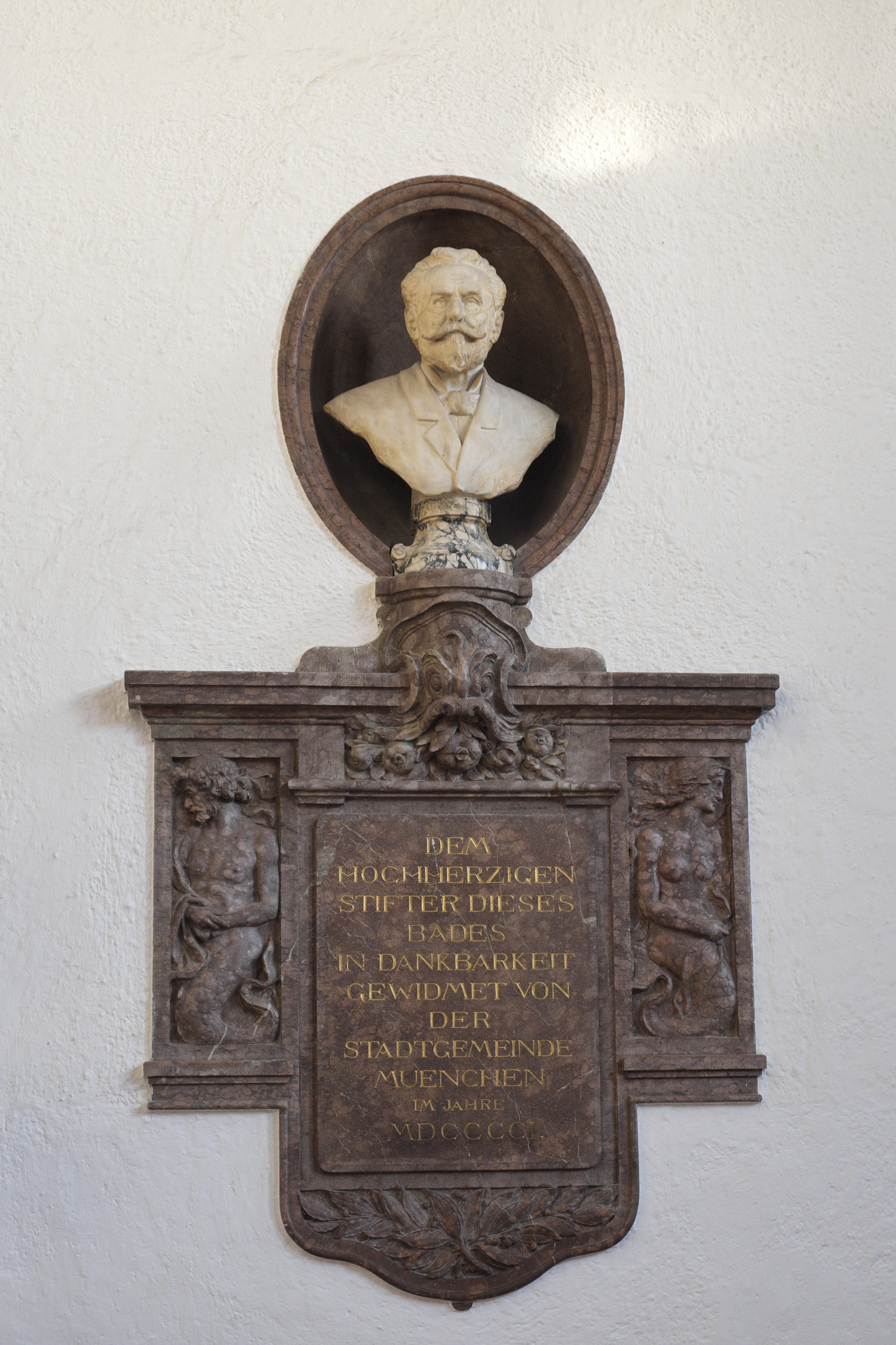 Müllersches Volksbad in Haidhausen im Stadtbezirk Au-Haidhausen in München (Bayern/Deutschland), Gedenktafel und Büste von Karl Müller